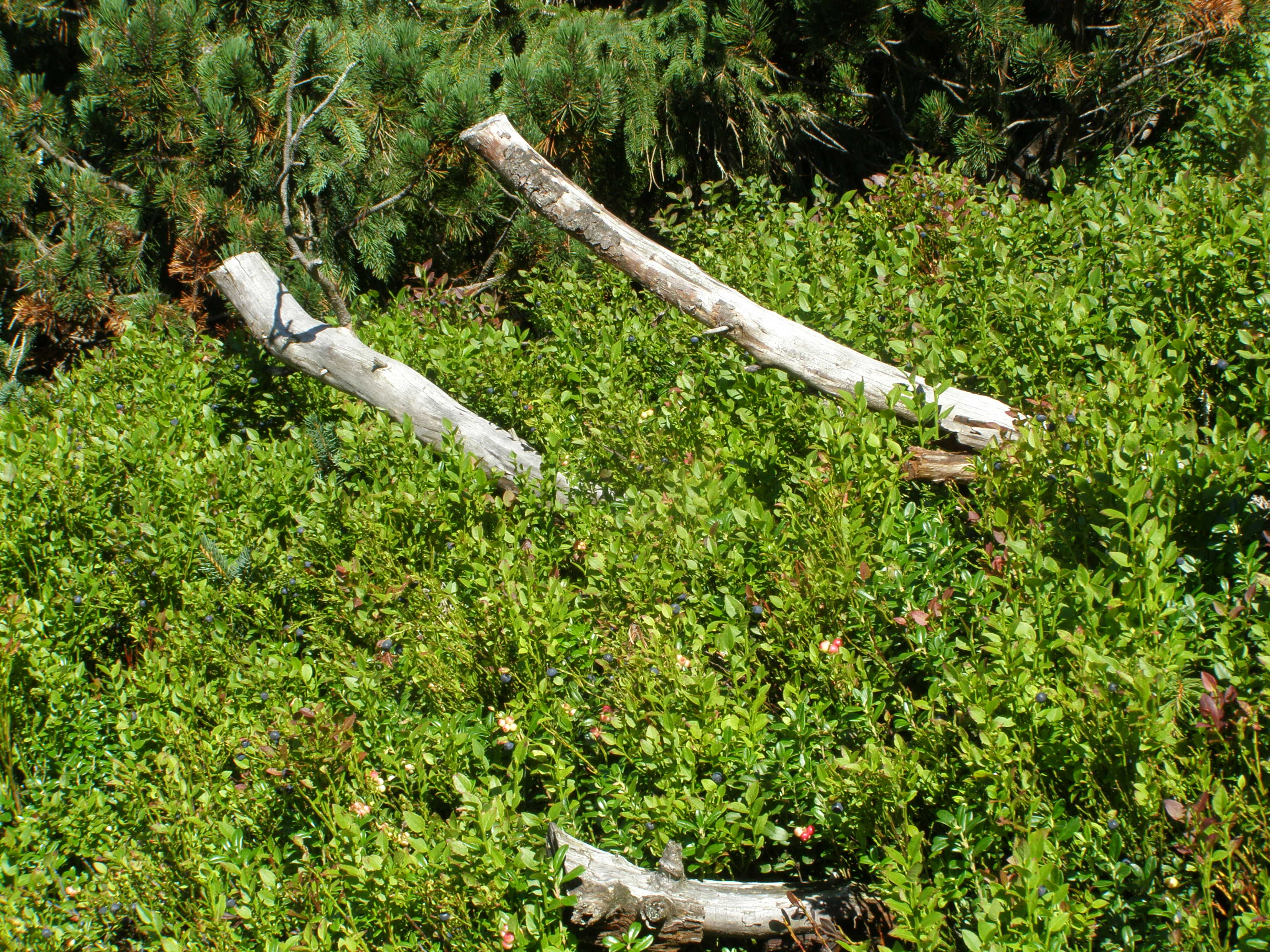 Nízké Tatry, Ďumbierské Tatry, borůvčí na jižním úbočí vrcholu Prašivá (1652 m)